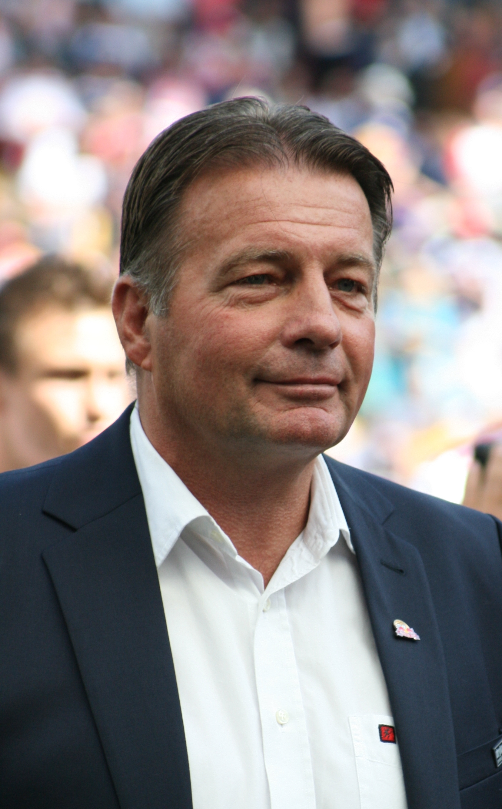 Co Adriaanse